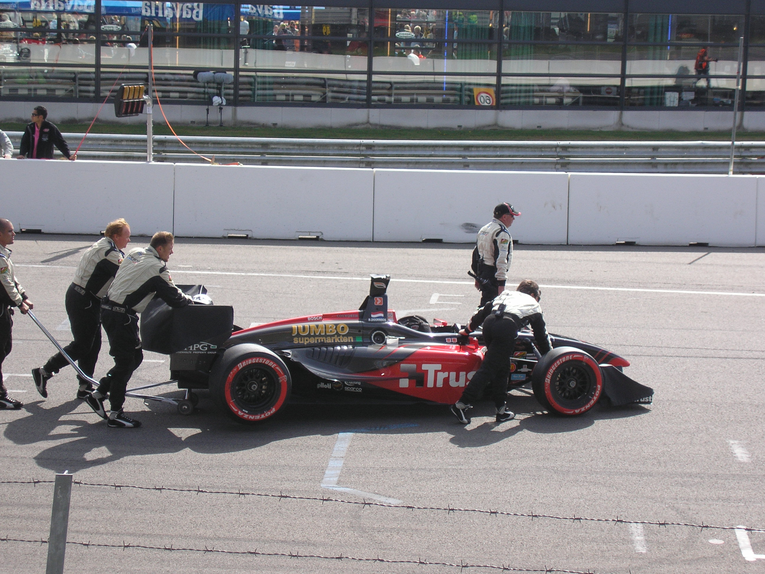 Doornbos zijn auto wordt naar de startplek geleid.